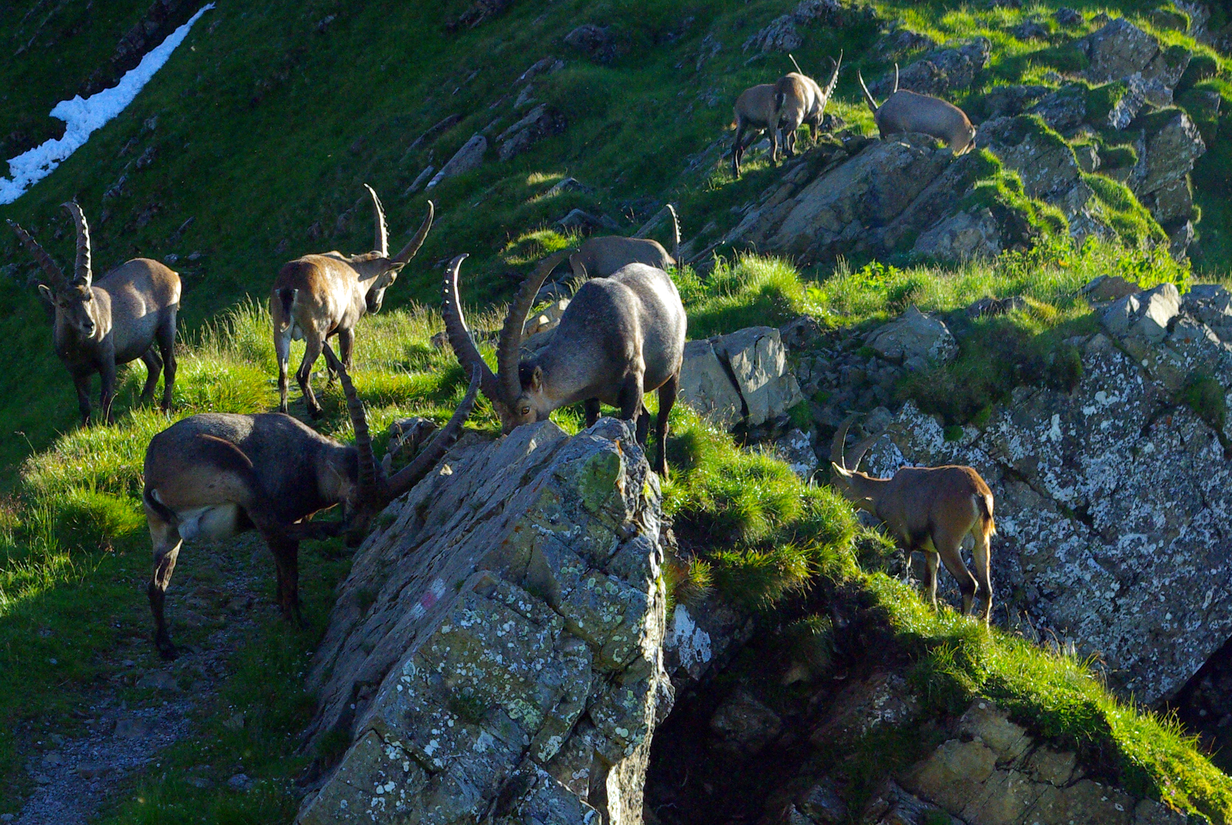 Eine Herde Steinböcke, wo?